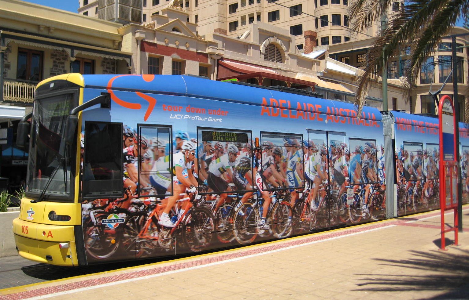 Tram @ Glenelg Jan 08